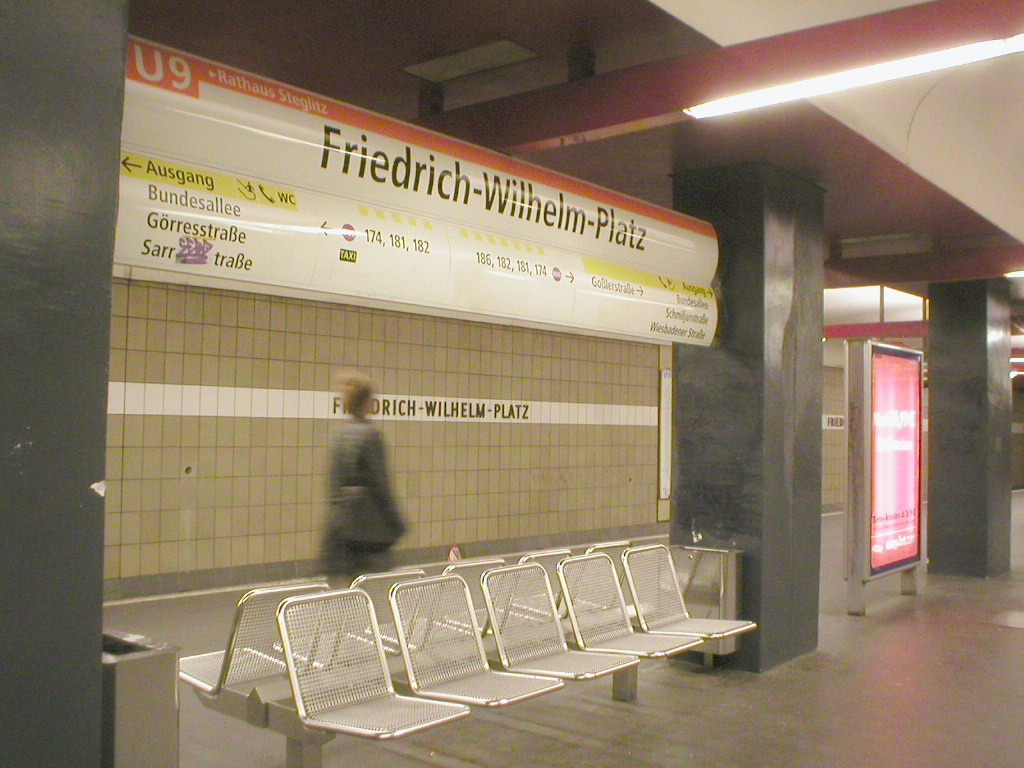 U-Bahn Berlin, Bahnhof Friedrich-Wilhelm-Platz